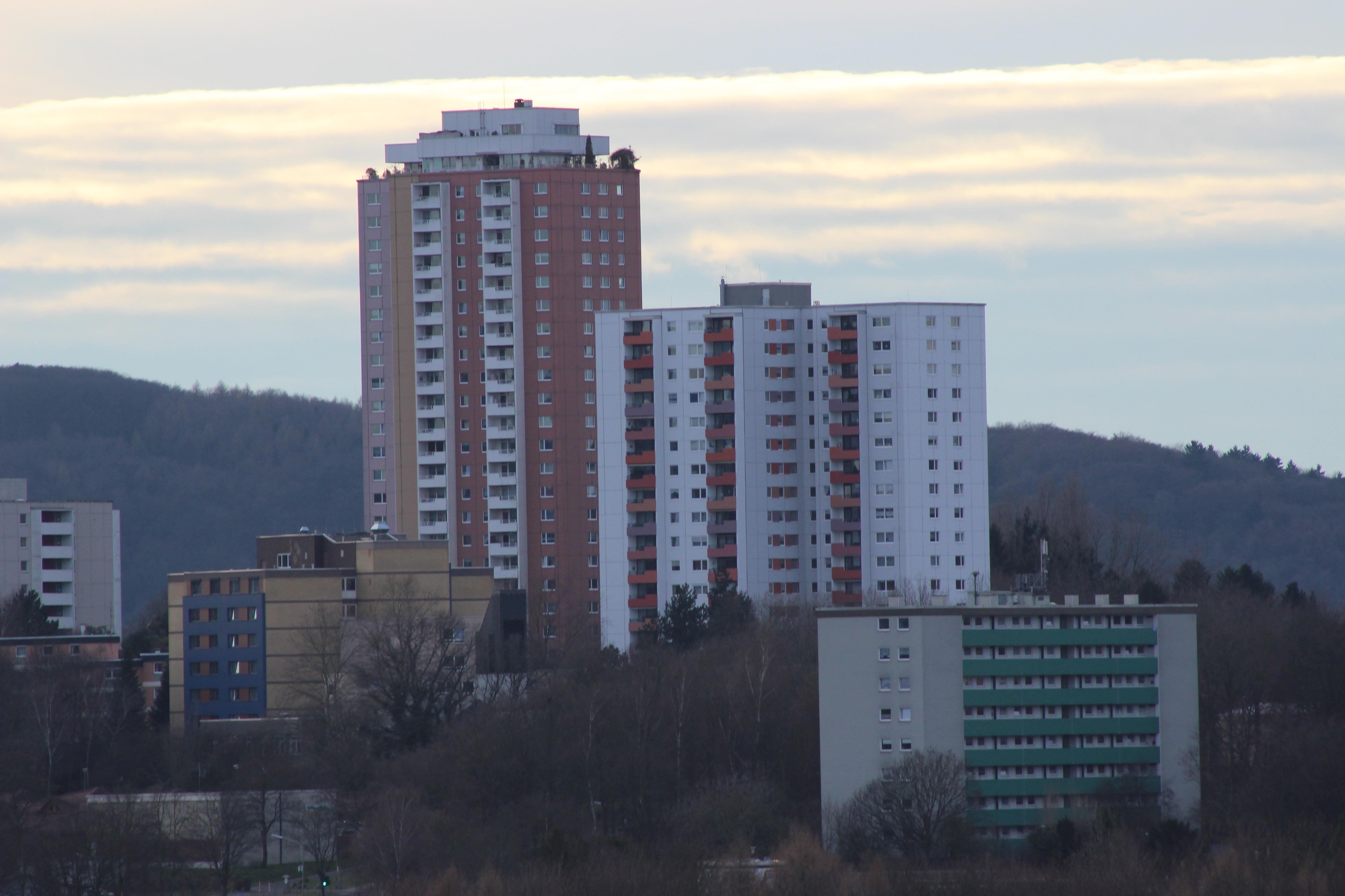 Die Helfer Hochhäuser sind weithin sichtbar.